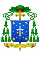 brasão do auxiliar do ordinariado militar